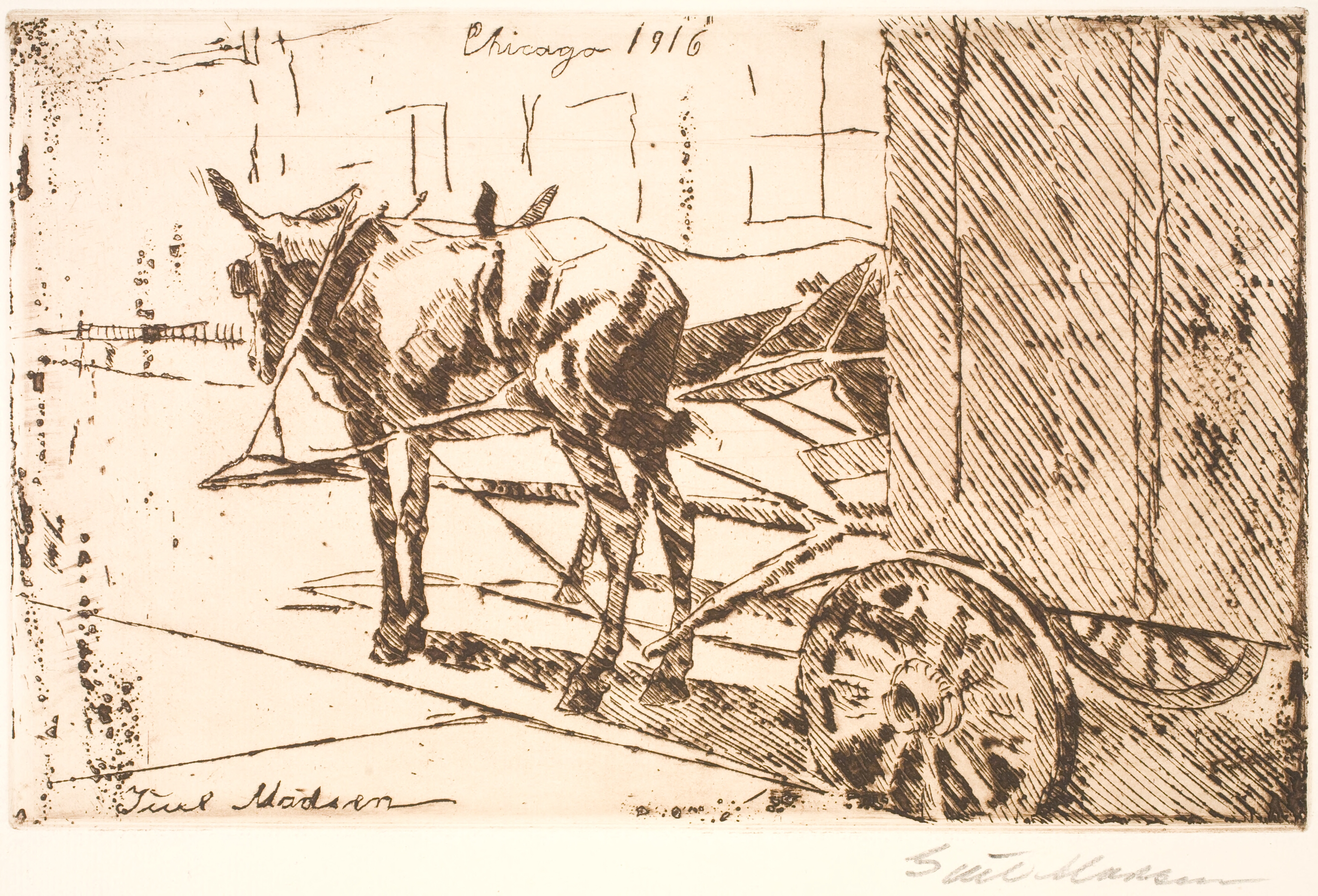 Raderingen er udført på Juel Madsens Amerikarejse i 1916. Den fanger lyset over byens husfacader og muldyrenes rygge, bag køretøjets skygge.